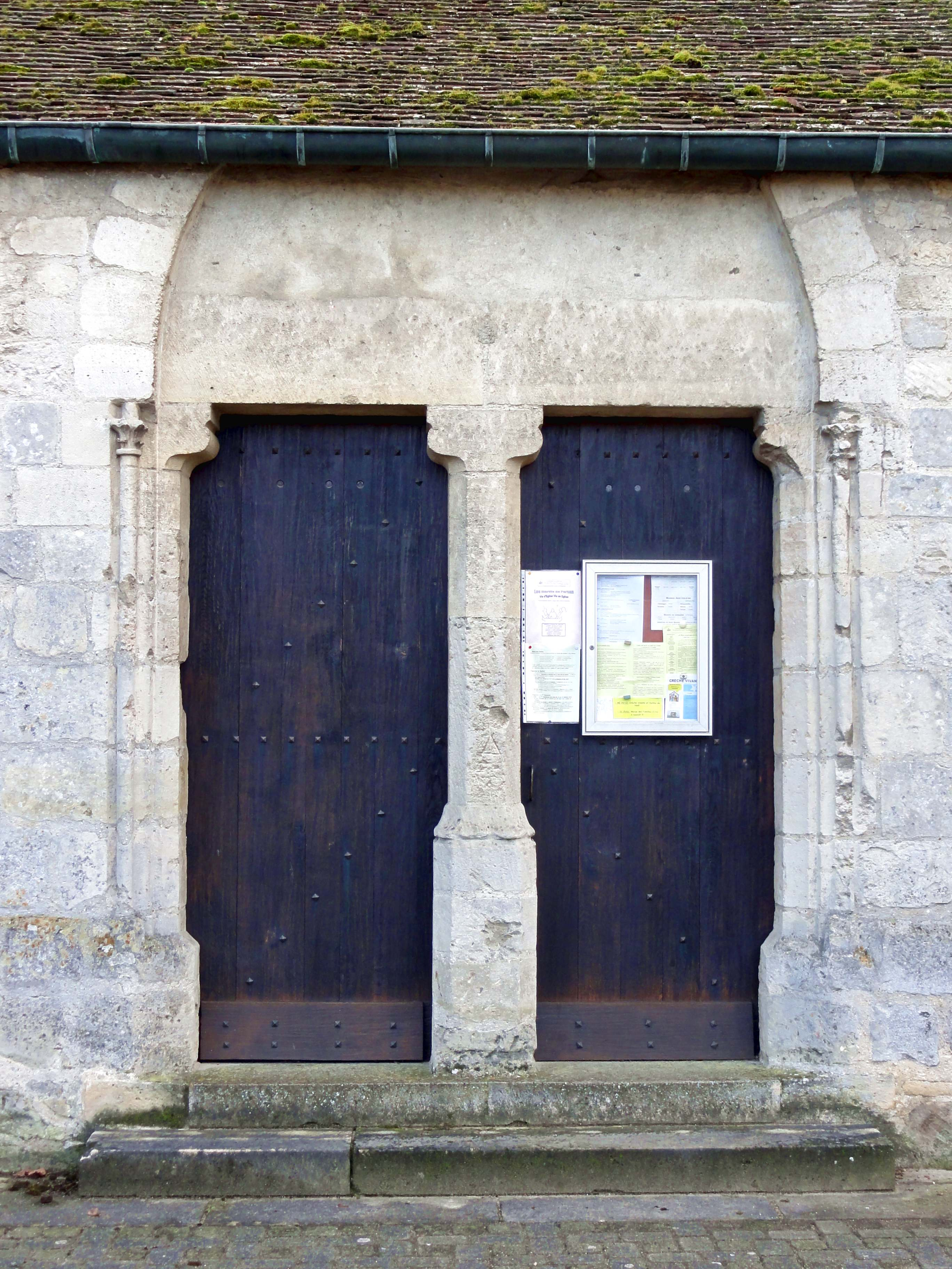 Bas-côté nord, portail latéral du XIVe siècle.